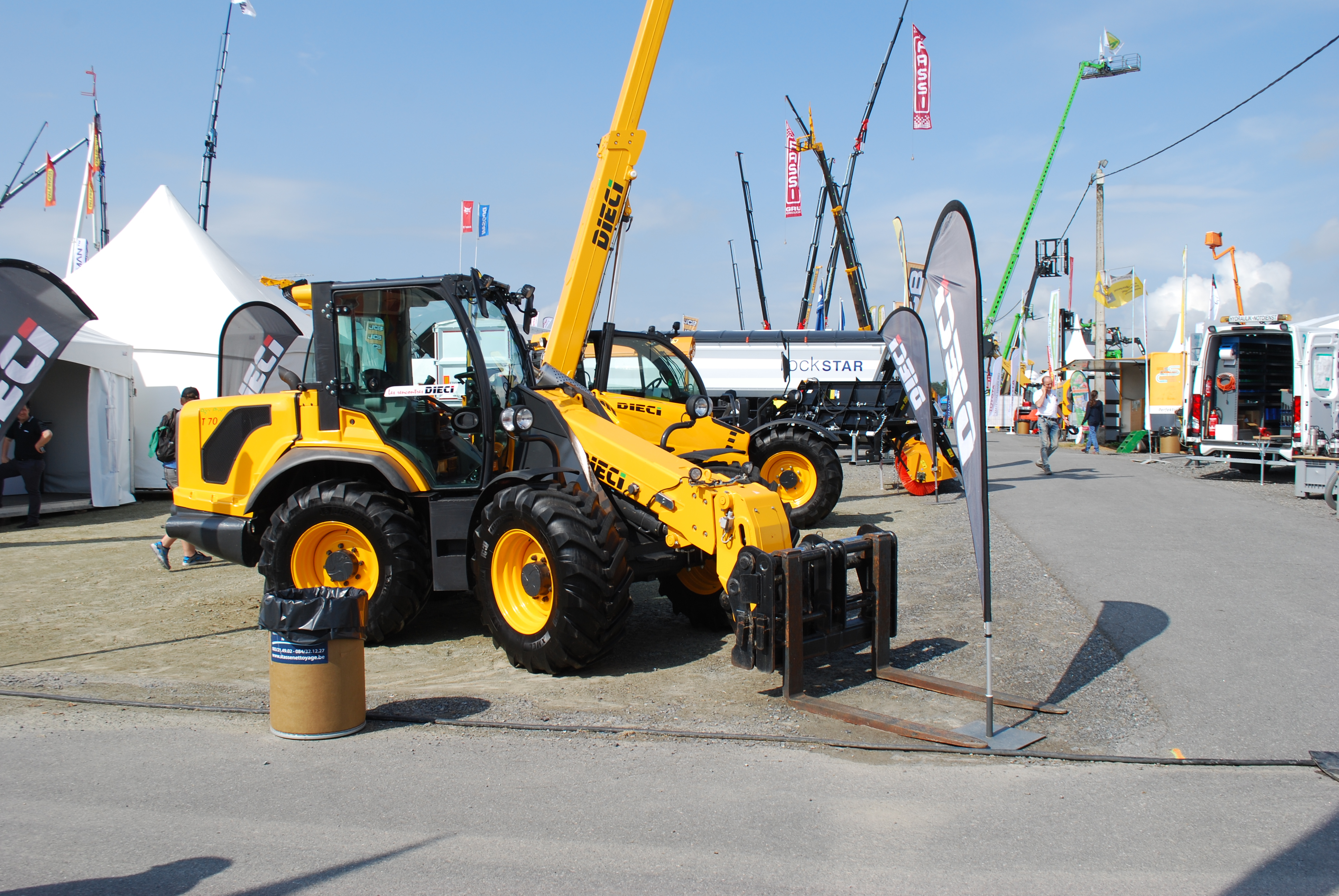 Vue de la Foire agricole de Libramont, dans le Luxembourg belge (82e édition en 2016).